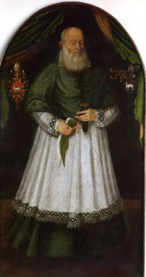 Erzbischof Stanislaw Karnkowski von Gnesen (1520-1603)